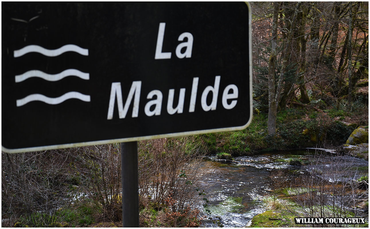 La rivière qui alimente la cascade des Jarrauds